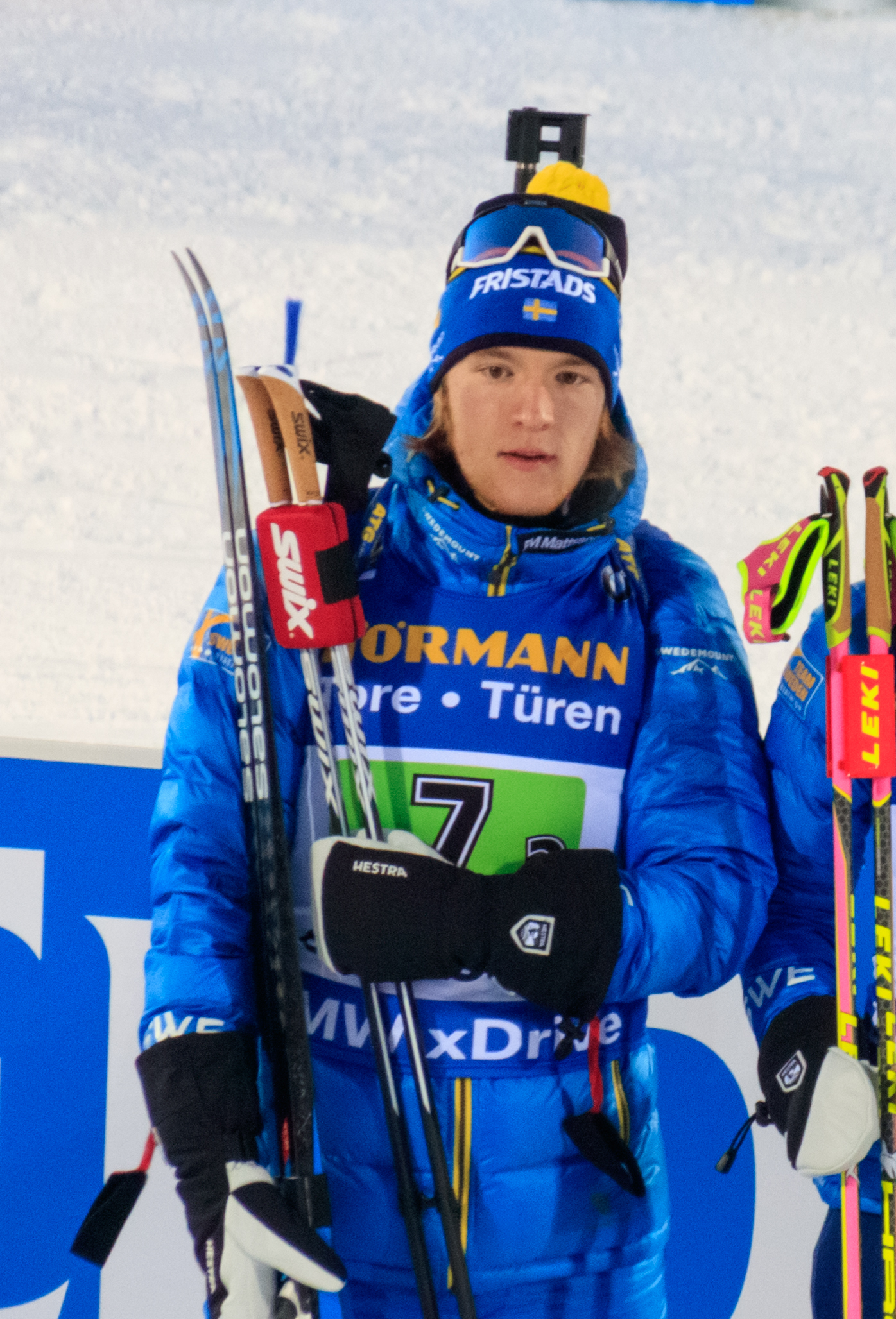 Sebastian Samuelsson vid Vm i skidskytte i Östersund 2019